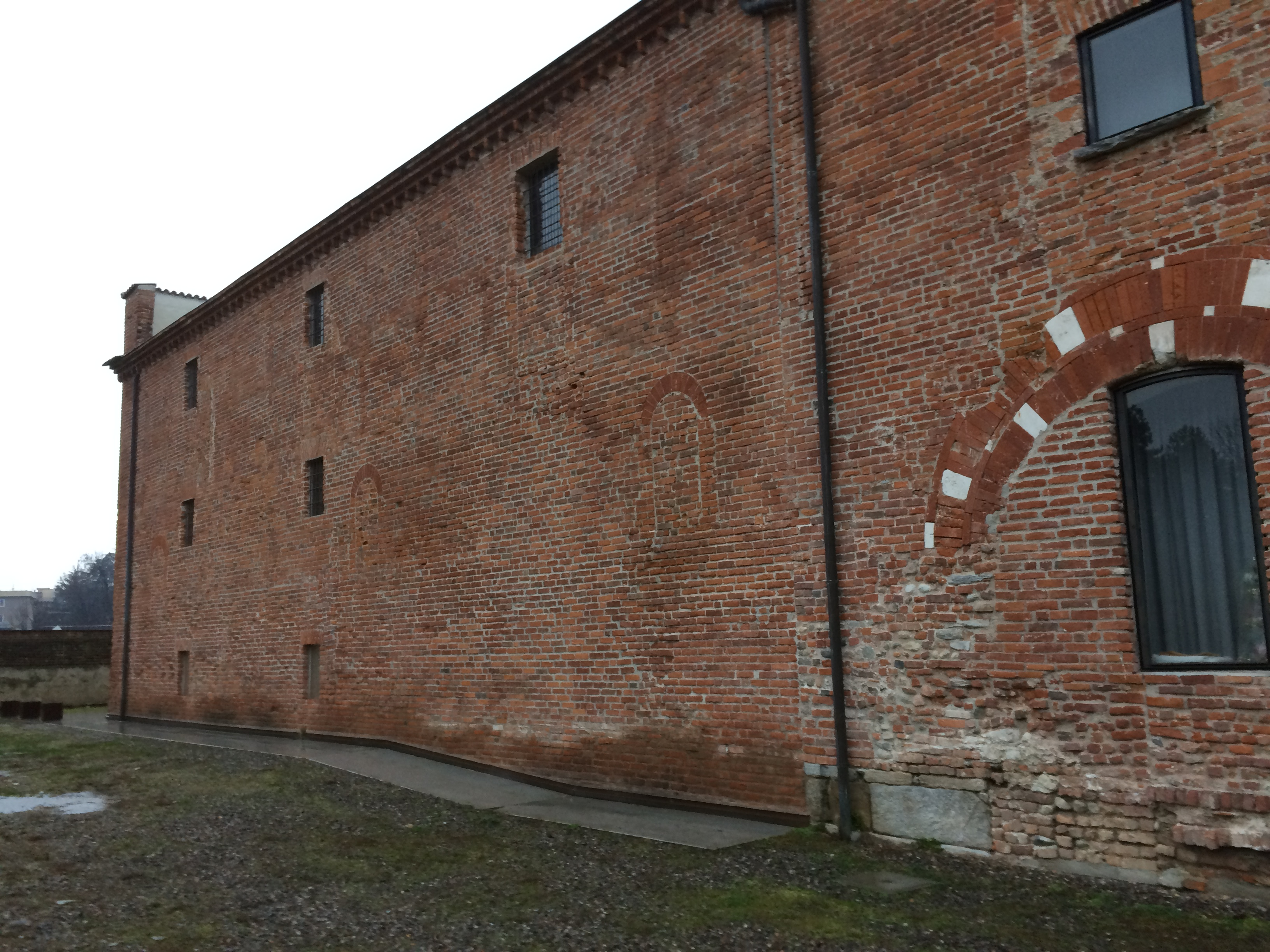 Castello di San Giorgio, Legnano